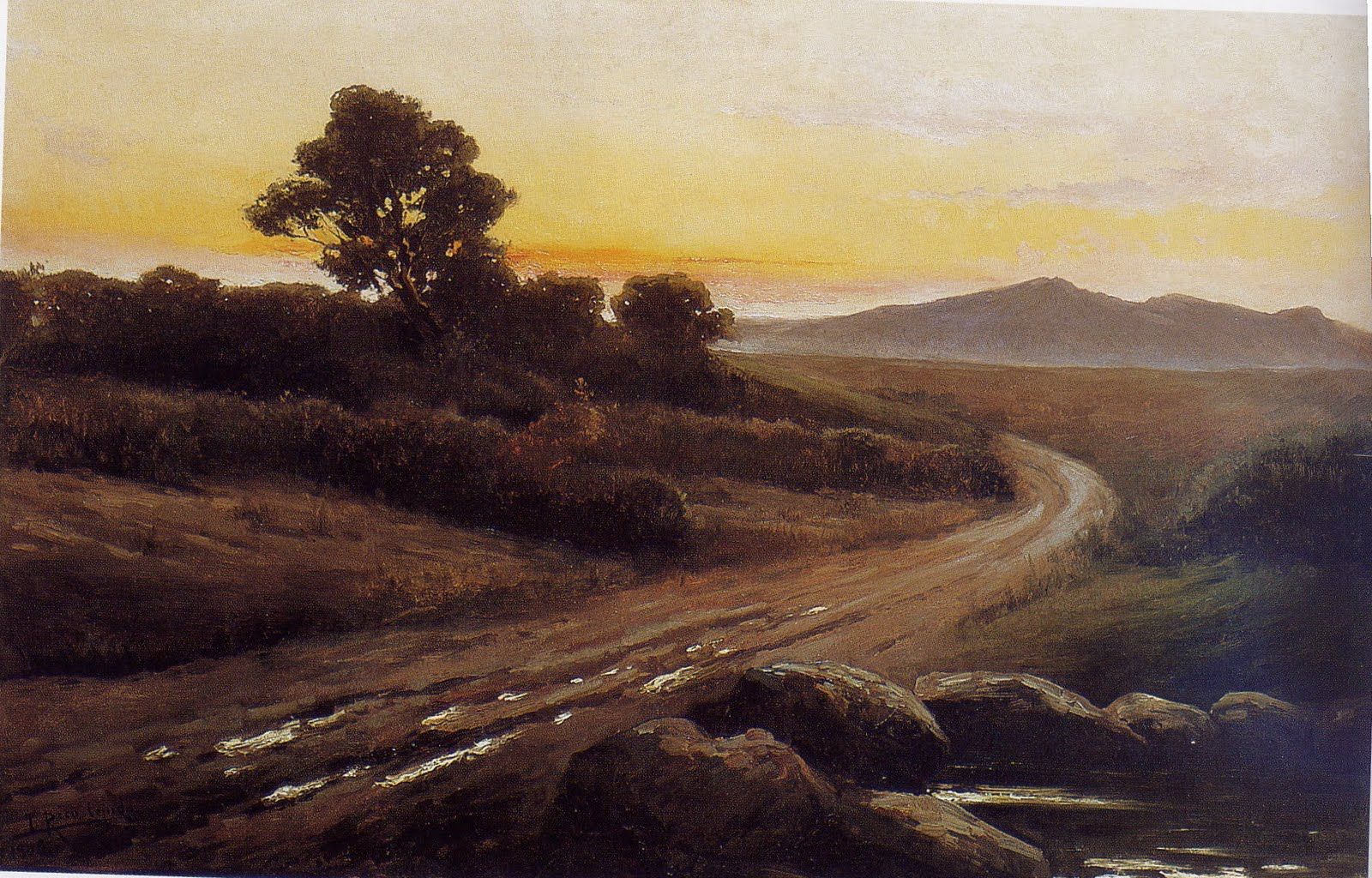 Obra de José Rico Cejudo